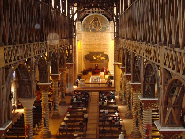 Fotografias tomadas por Javier Herrera Zuñiga (jh_manguare) durante el mes de marzo de 2008 en desarrollo de la restauracion de la fachada de la catedral